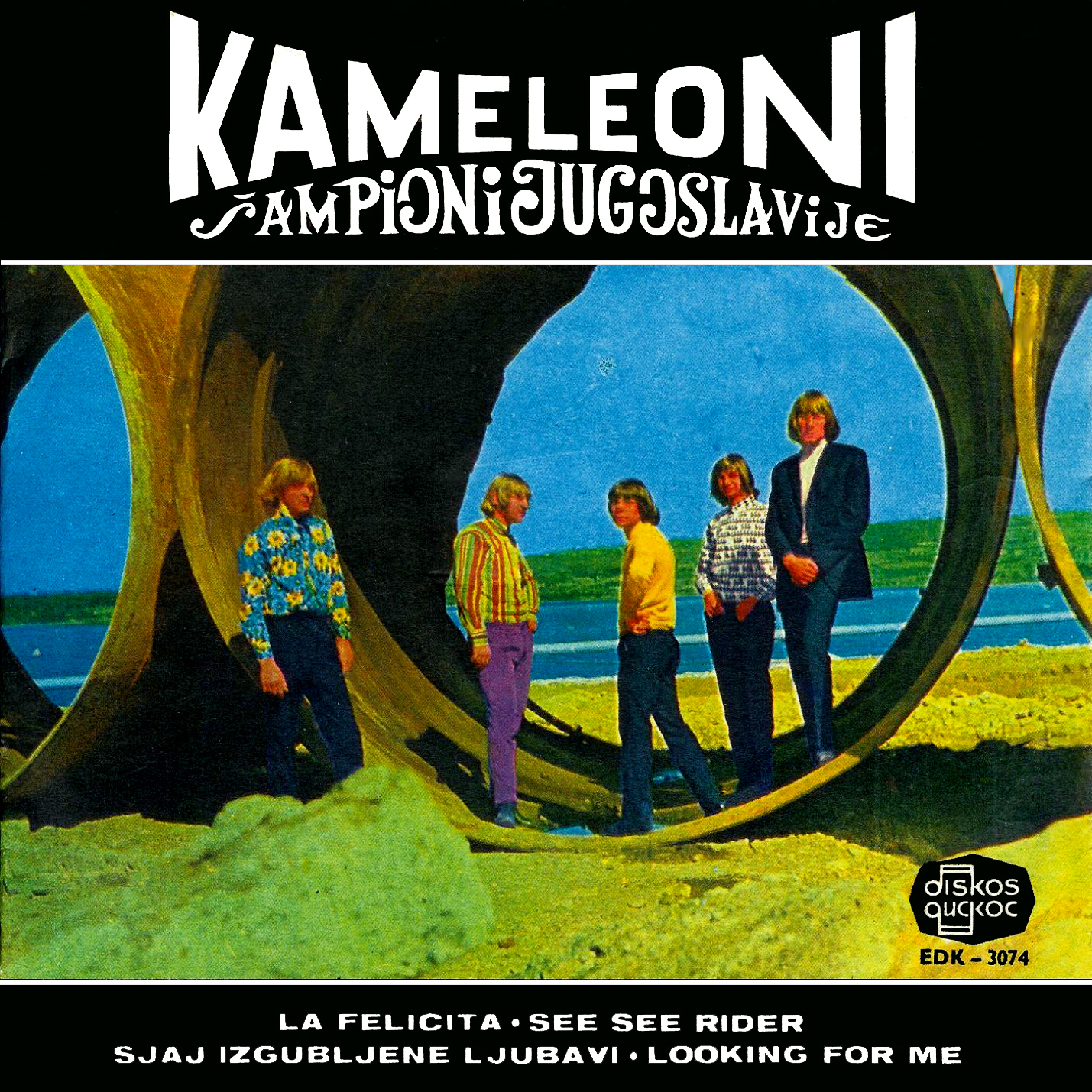 Skupina Kameleoni na naslovnici plošče Šampioni Jugoslavije.